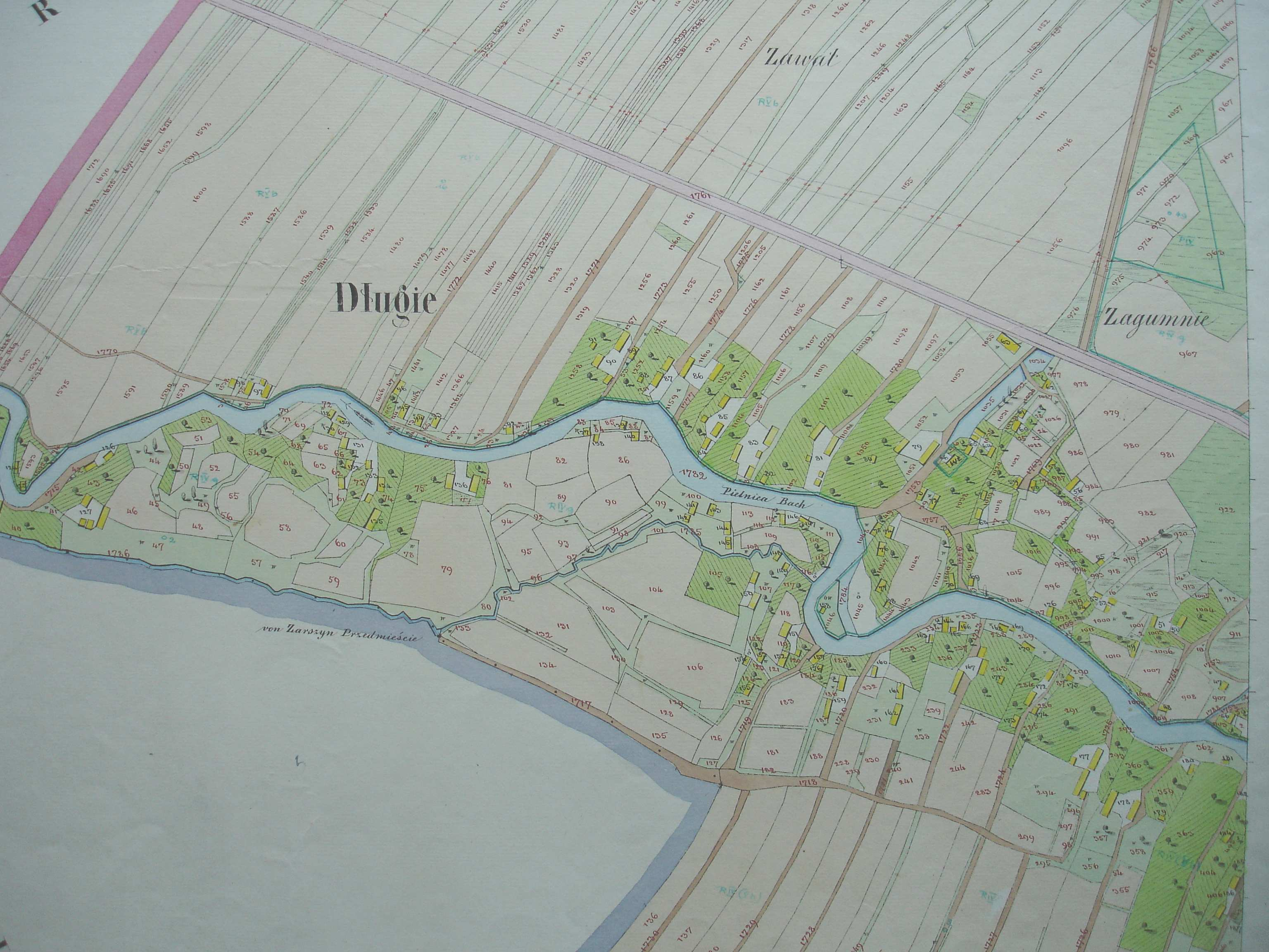 mapa katastralna miejscowość Długie z roku 1852, dodal Marek Silarski, Bielsko-Biala